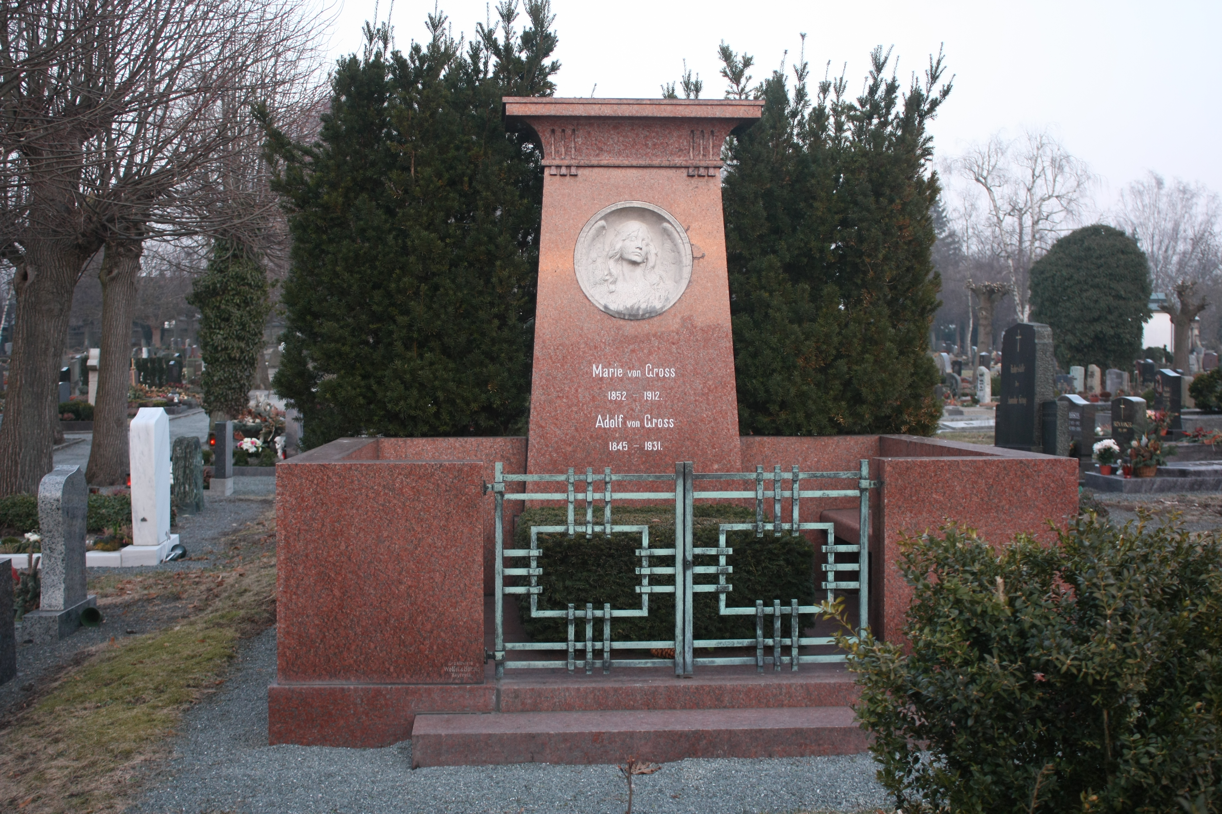 Grabmal von Adolf von Groß zu Bayreuth (Friedhof Sankt Georgen)